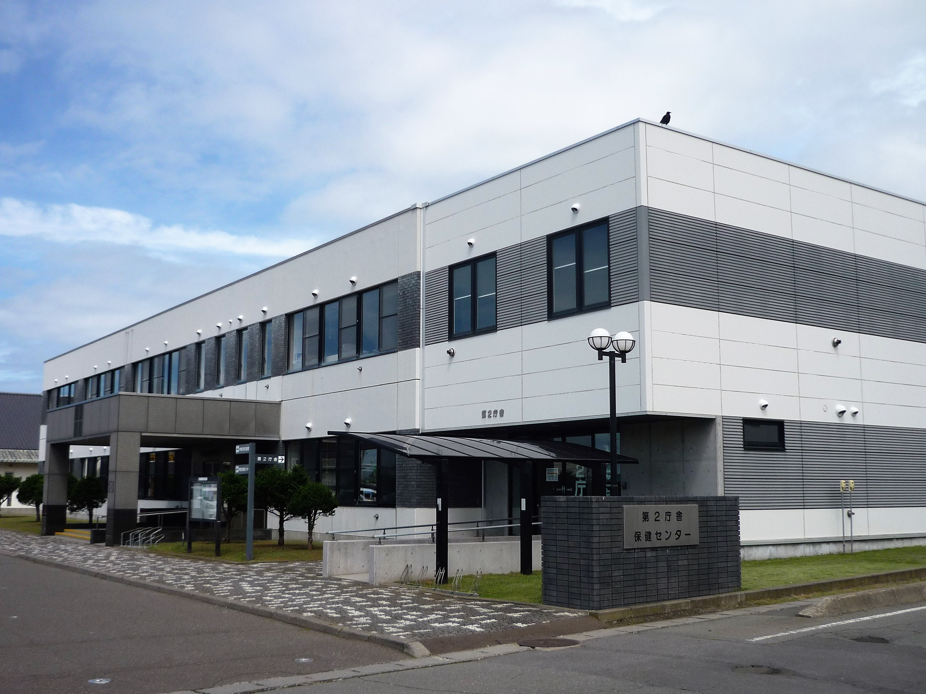 伊達市役所第2庁舎・保健センター Panasonic Lumix DMC-FS3